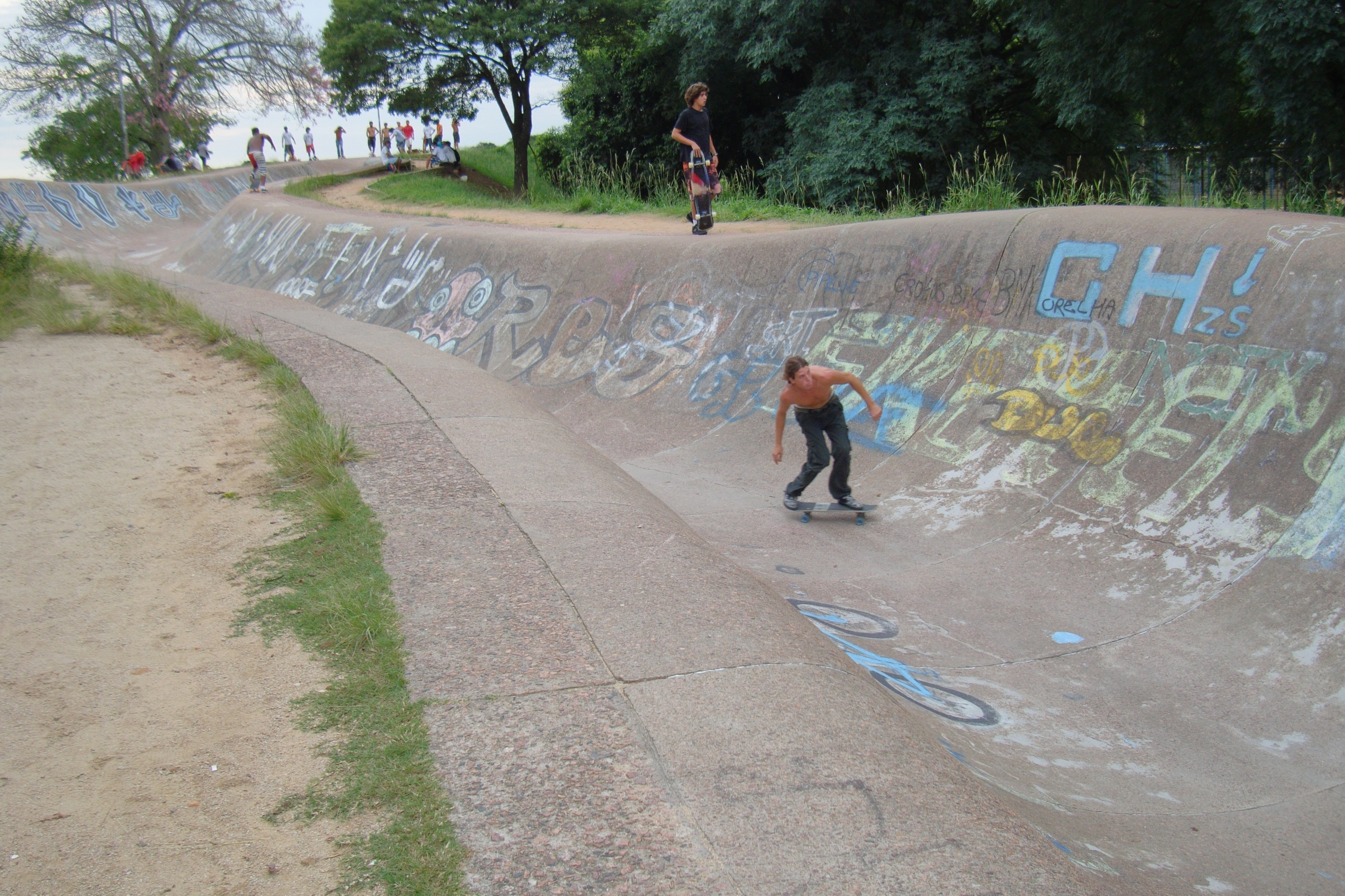 Parque Marinha do Brasil